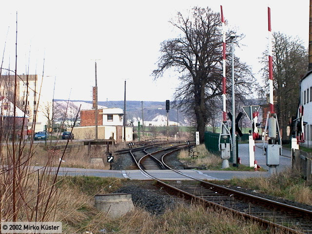 Blick auf das Roßlebener Bahnhofsgelände, von Artern kommend.